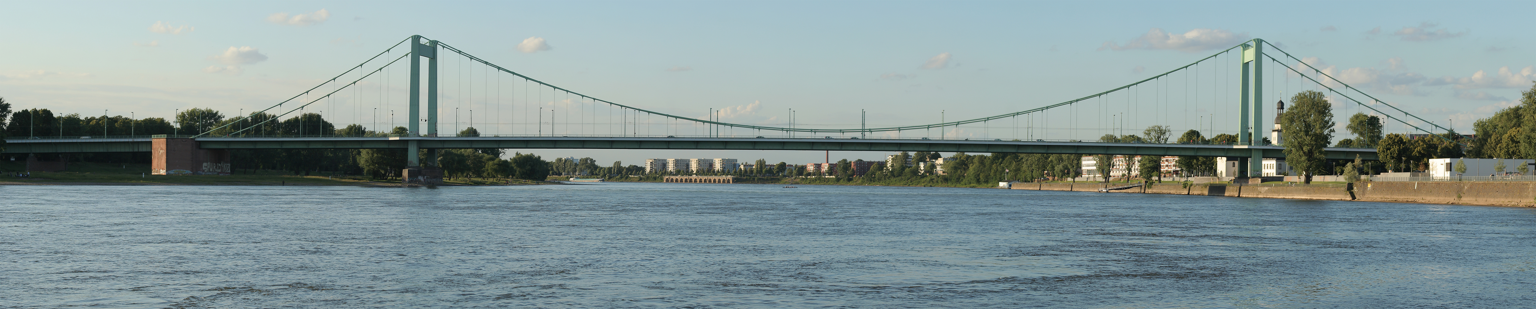 Die Mülheimer Brücke in Köln. Dieses Panoramabild wurde aus acht Einzelaufnahmen mit PTGui erstellt. NOTE: This image is a panorama consisting of multiple frames that were merged or stitched in software. As a result, this image necessarily underwent some form of digital manipulation. These manipulations may include blending, blurring, cloning, and colour and perspective adjustments. As a result of these adjustments, the image content may be slightly different from reality at the points where multiple images were combined. This manipulation is often required due to lens, perspective, and parallax distortions.